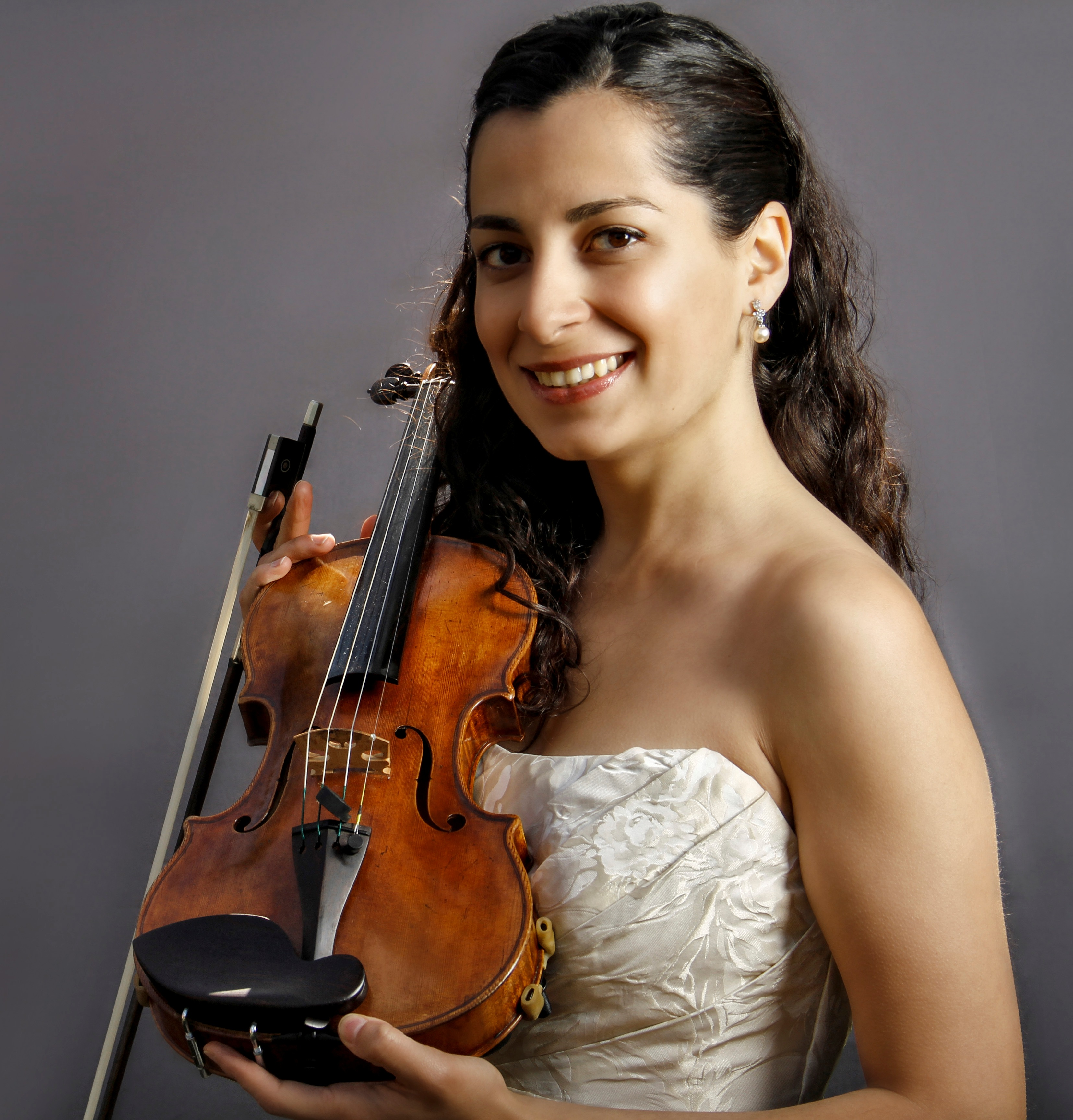 Անի Բատիկյան